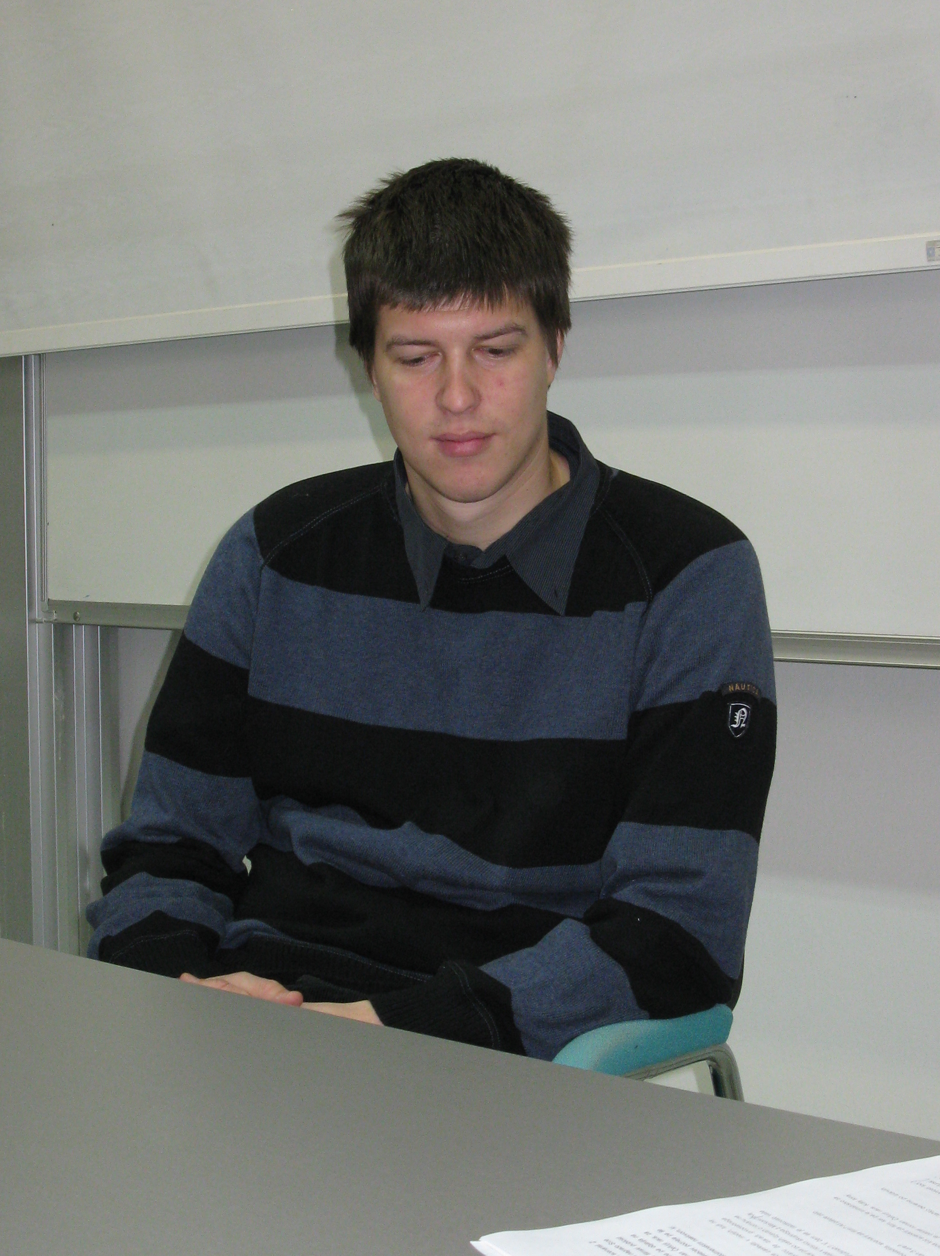 Goran Vojnović, slovenski pisatelj, režiser Goran Vojnović, Slovene writer